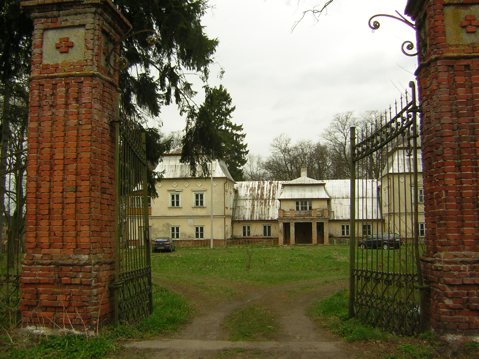 Hruszniew - XIX-wieczny dwór z parkiem.